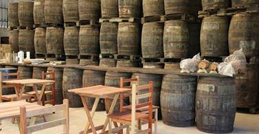 Toneis de cachaça Sapucaia Pirassununga